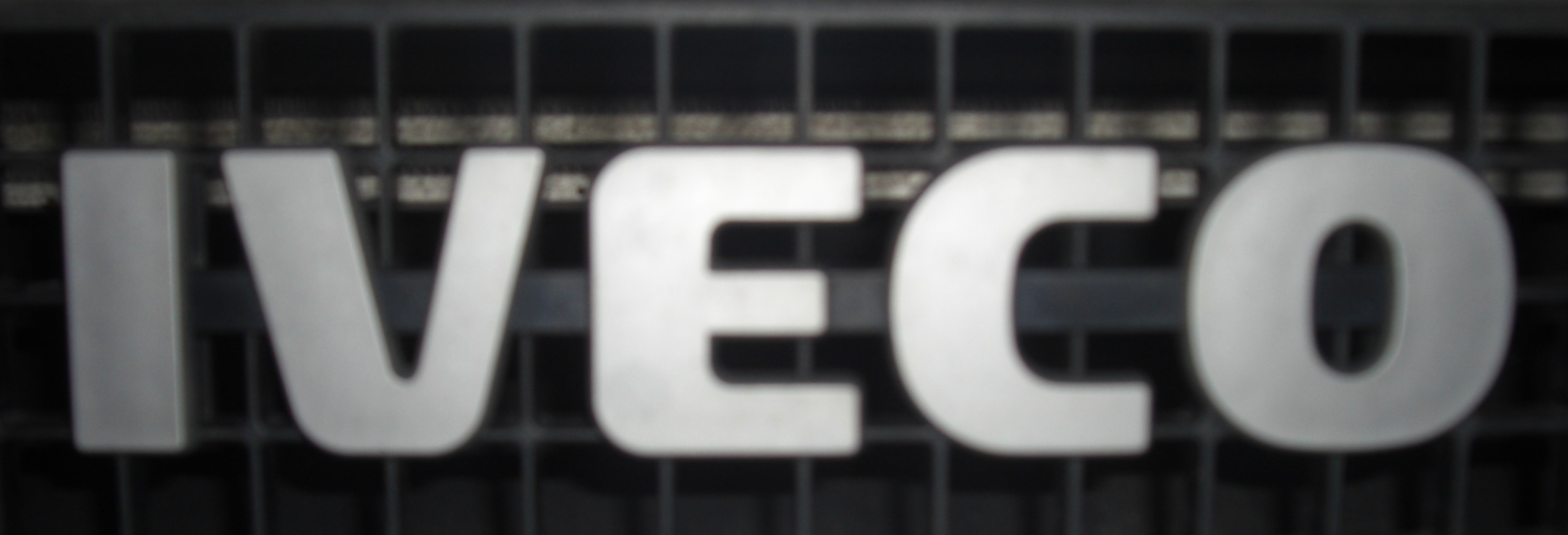 Iveco